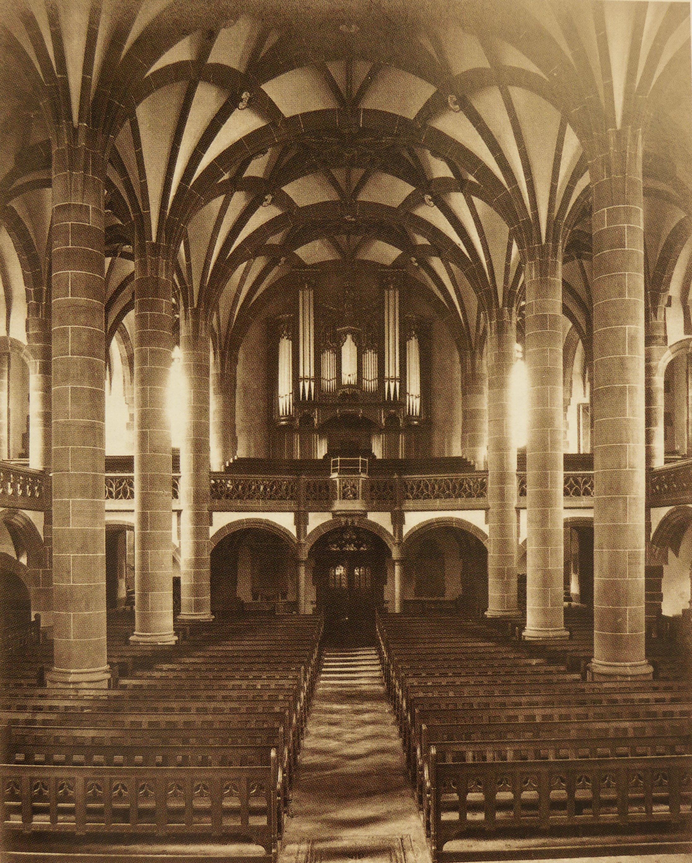 Alexanderkirche (Zweibrücken), Innenraum vor der Zerstörung vom 14. März 1945, Blick zur Orgel